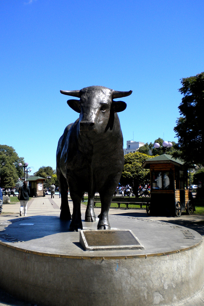 Toro de la plaza de armas de Osorno